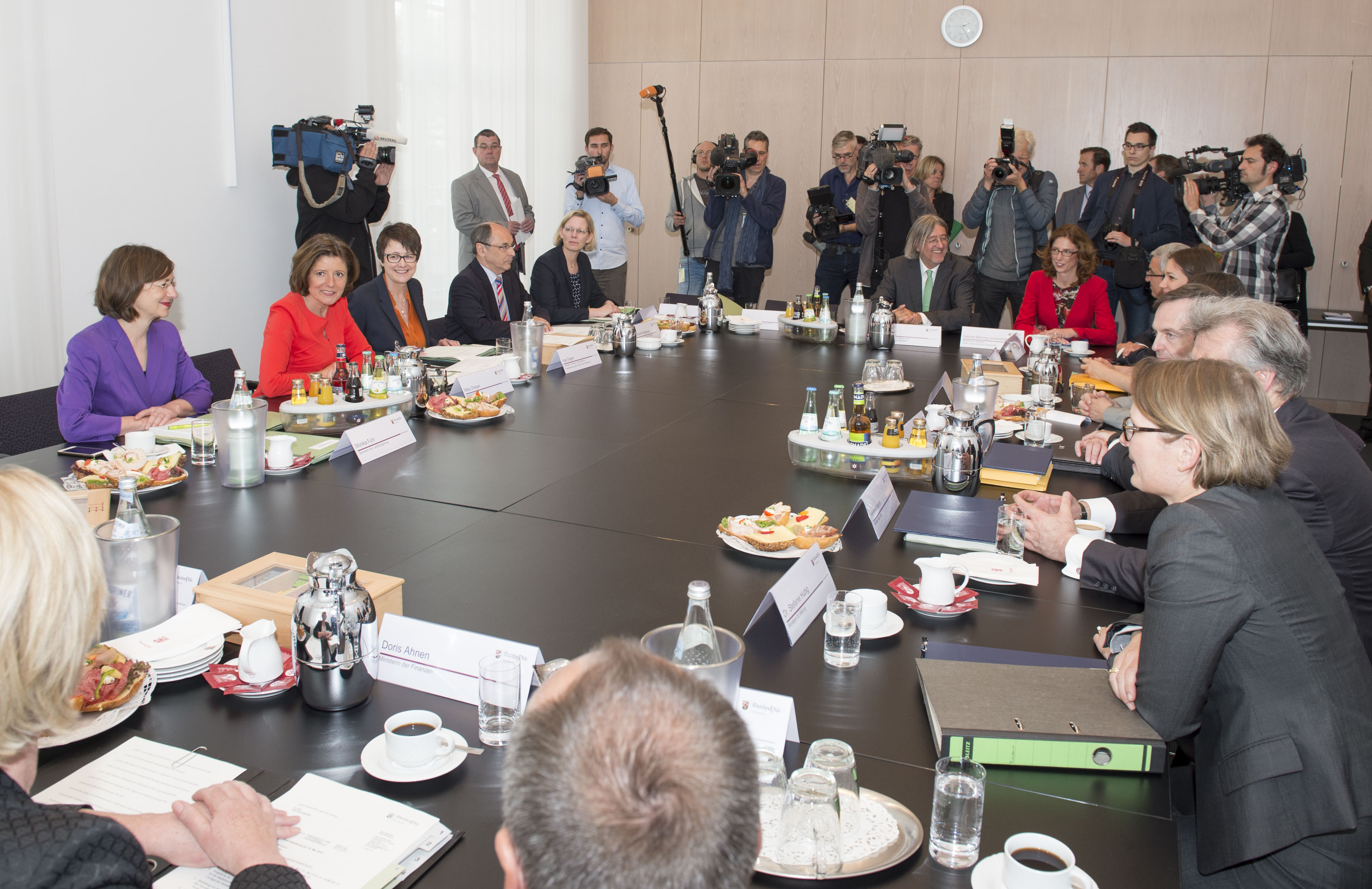 1. Ministerratssitzung Kabinett Dreyer II